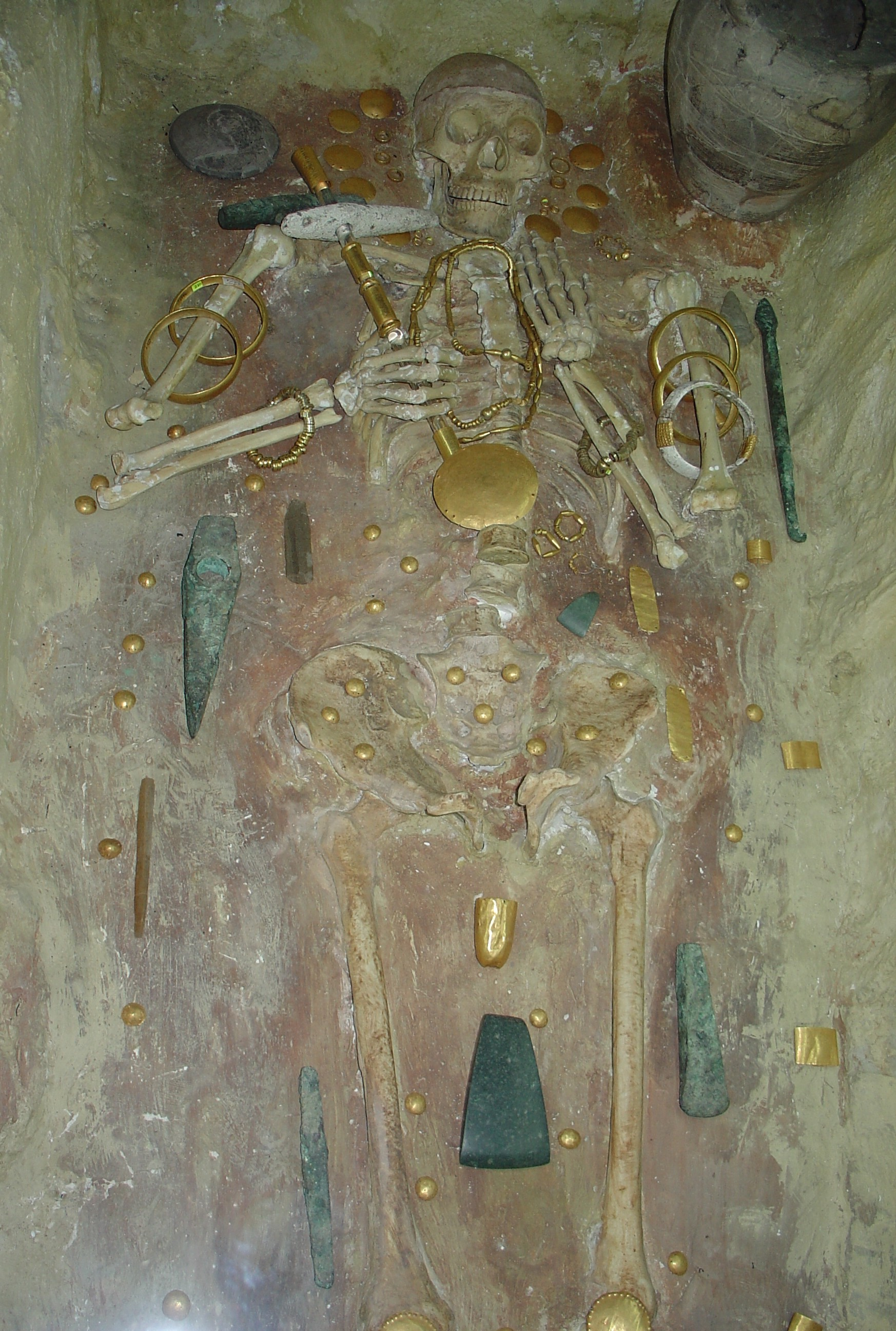 La tumba de la necrópolis de Varna (Bulgaria), que data de 4600 aC con la joyería de oro más antiguo del mundo A tomb from the Varna necropolis (Bulgaria), circa 4600 BC, with the world's oldest gold jewellery yet discovered.